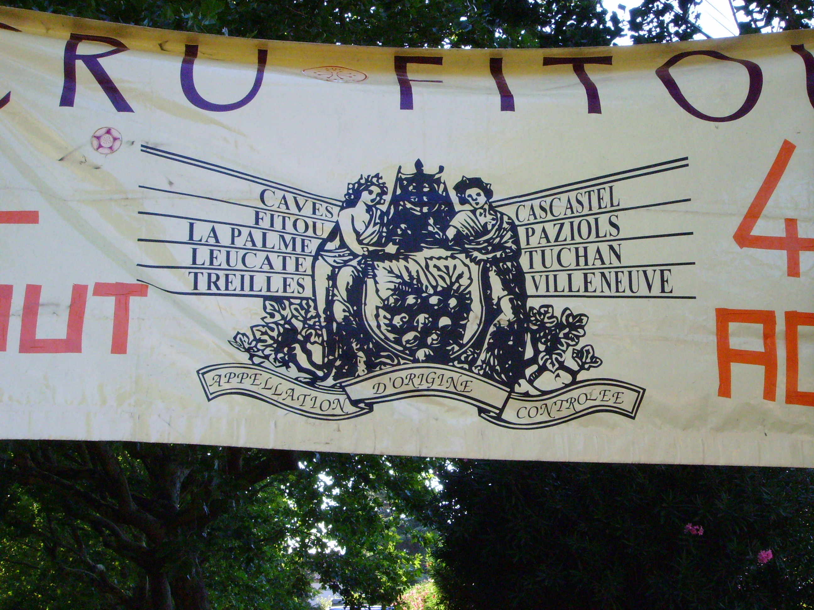 Paziols, Département Aude, France: banner "Cru Fitou" La fete vigneronne de l'Ete, 04. aout 2006 author: Gerbil